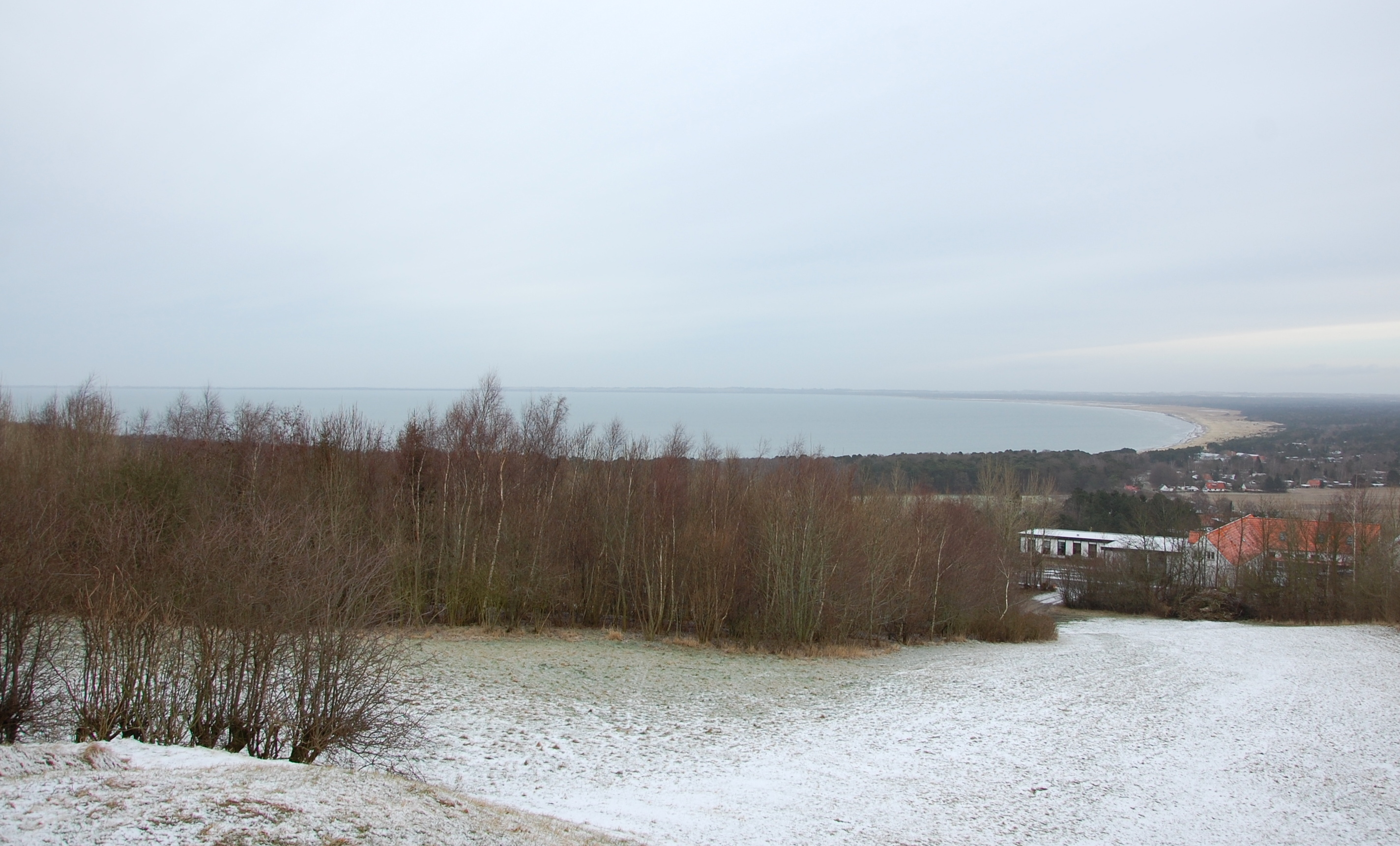 Sejerobucht, Blick vom Esterhoj